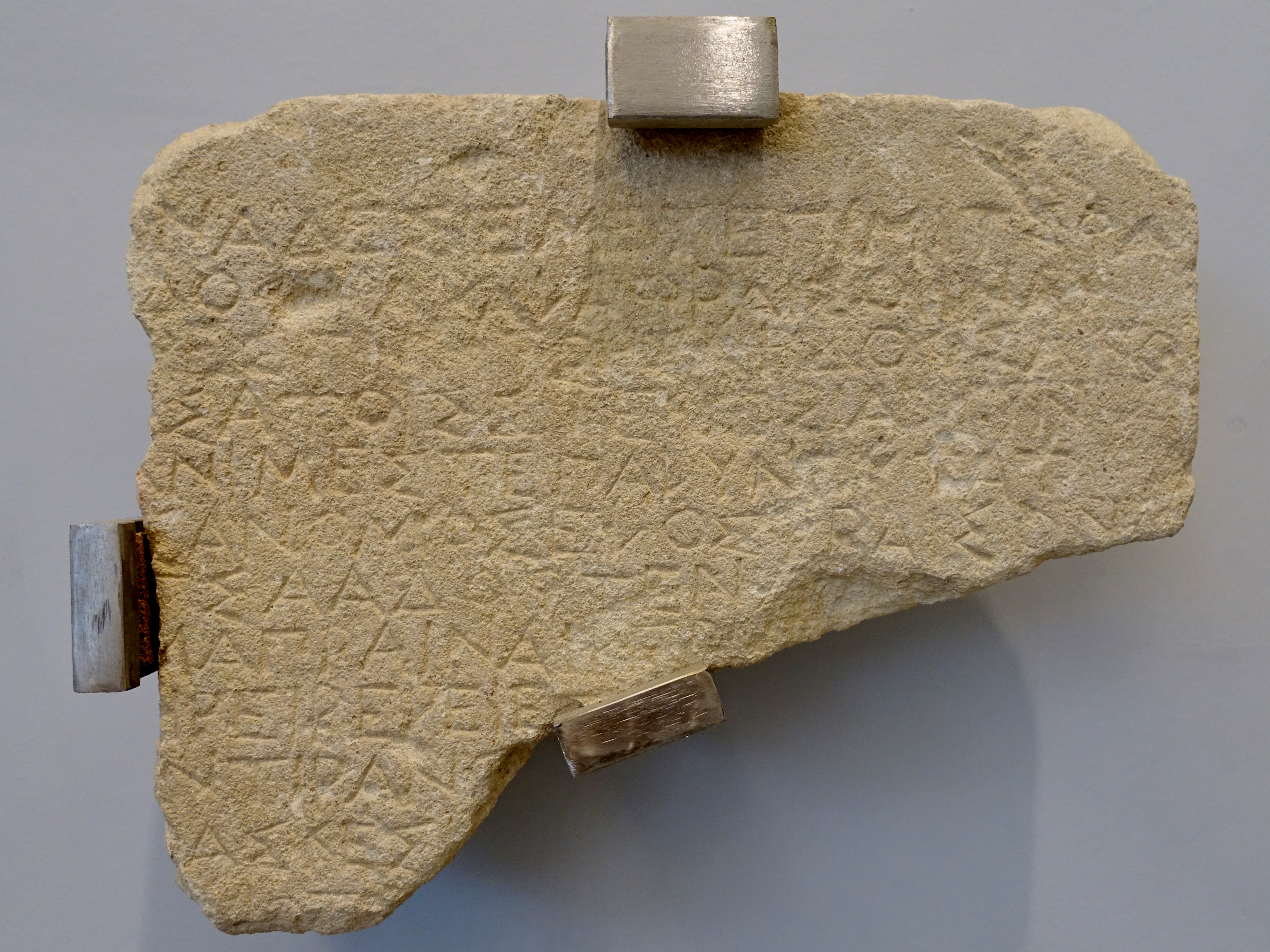 Eteokretische Inschrift, geschrieben mit griechisch-ionischem Alphabet, aus Praisos (4. Jahrhundert v. Chr.), ausgestellt im Archäologischen Museum Iraklio, Kreta, Griechenland